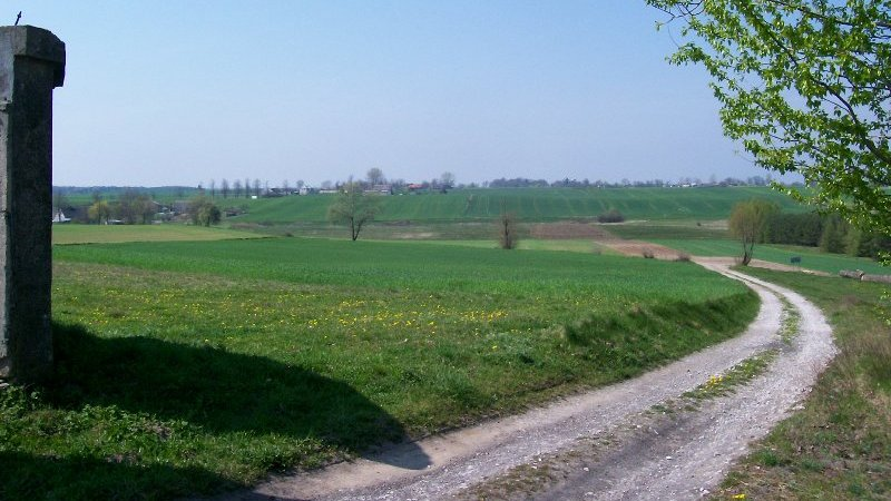 Kierunek zachodni, w oddali Czarne Górne.